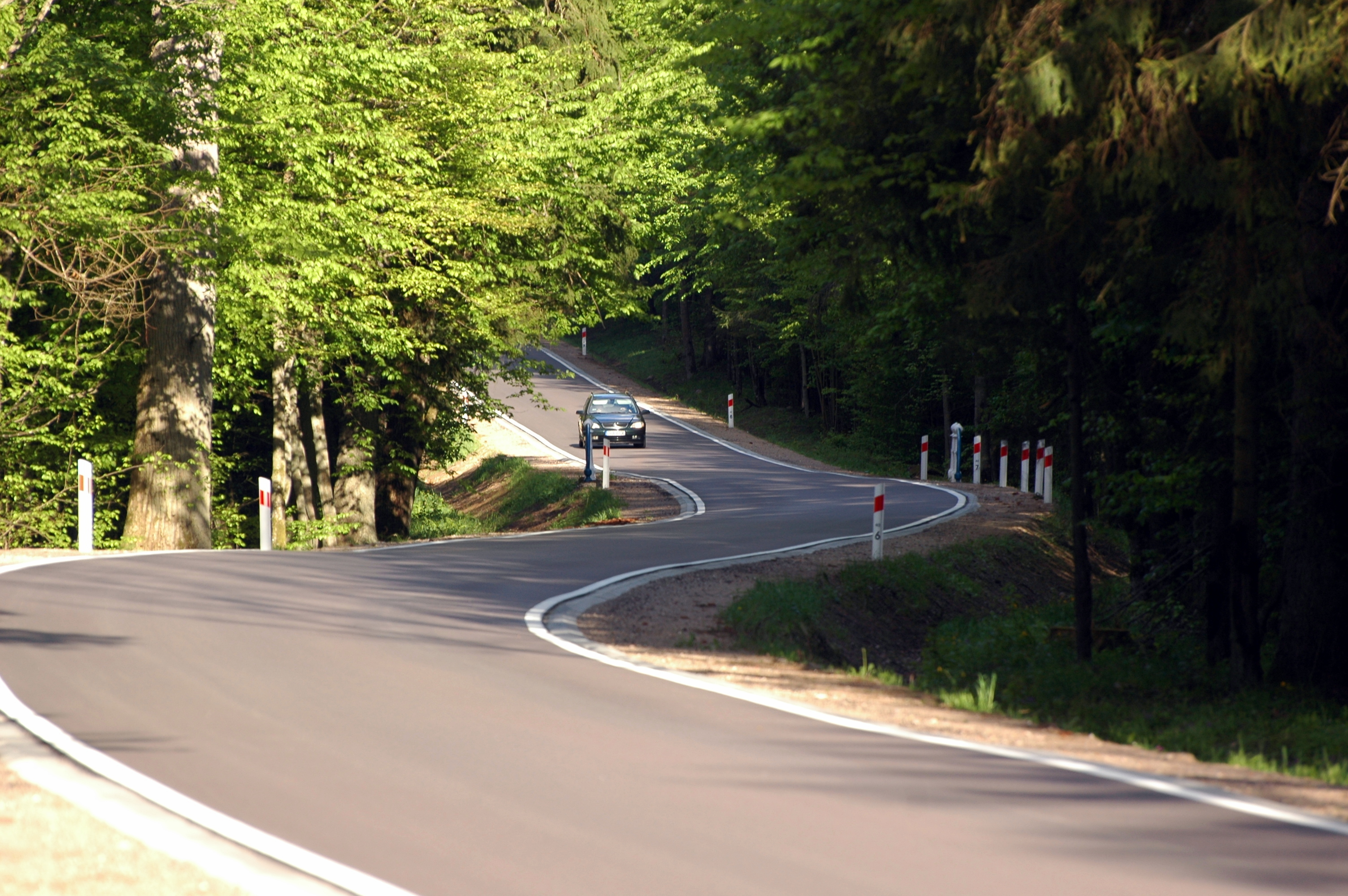 Droga wojewódzka nr 689 koło Białowieży